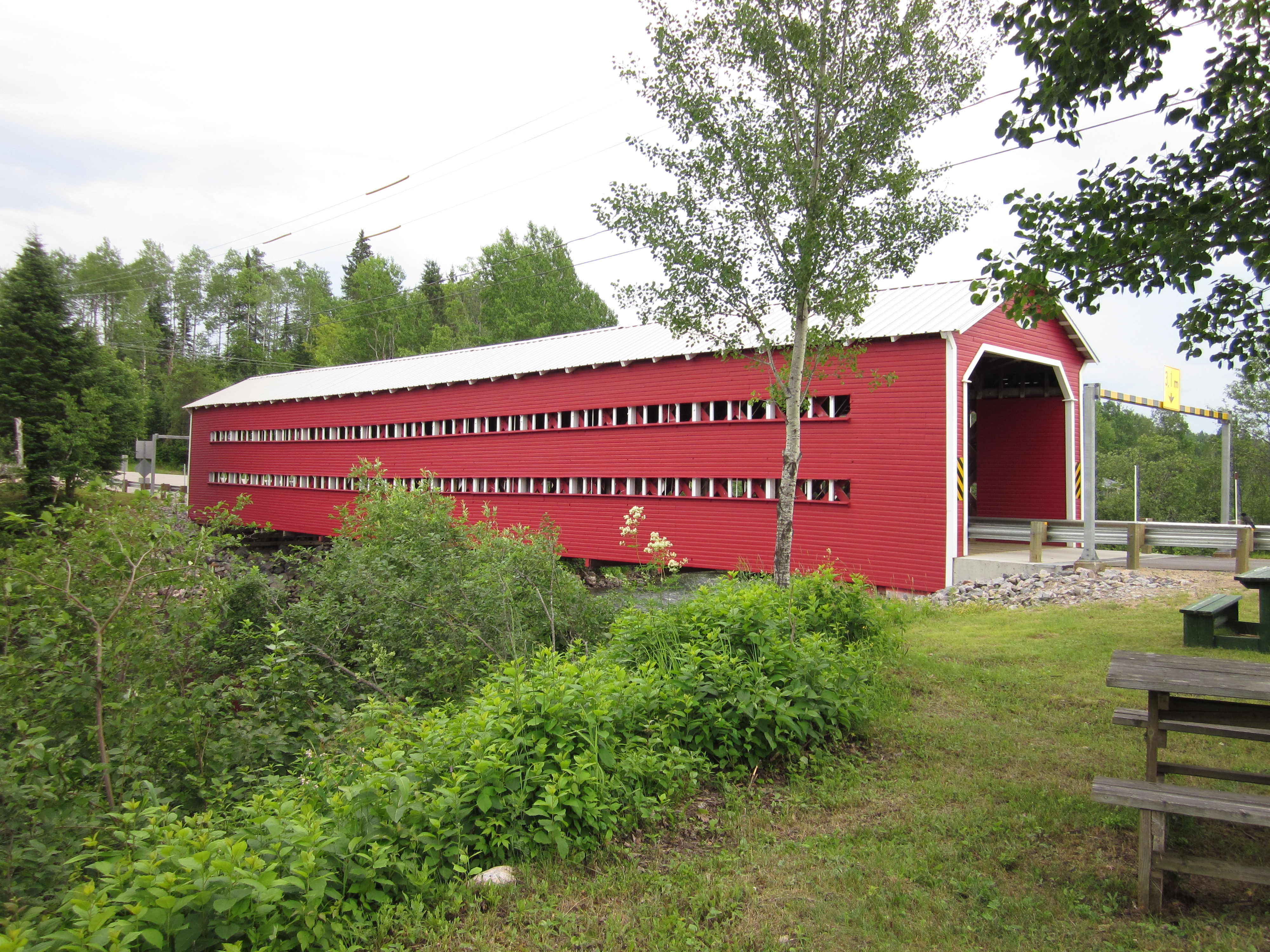 Pont Ducharme vue du côte Ouest.